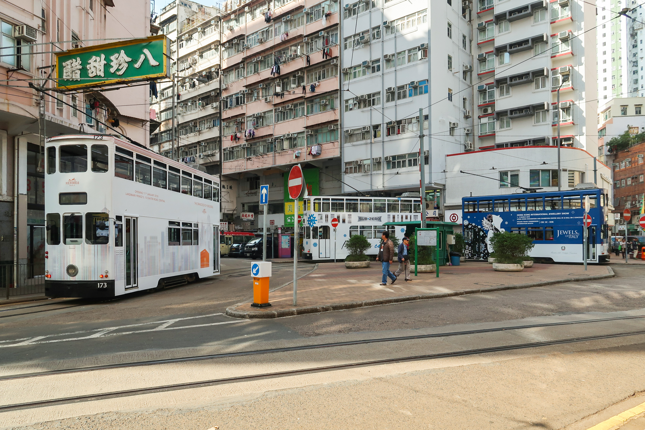 Shau Kei Wan Main Street East Tram Terminus